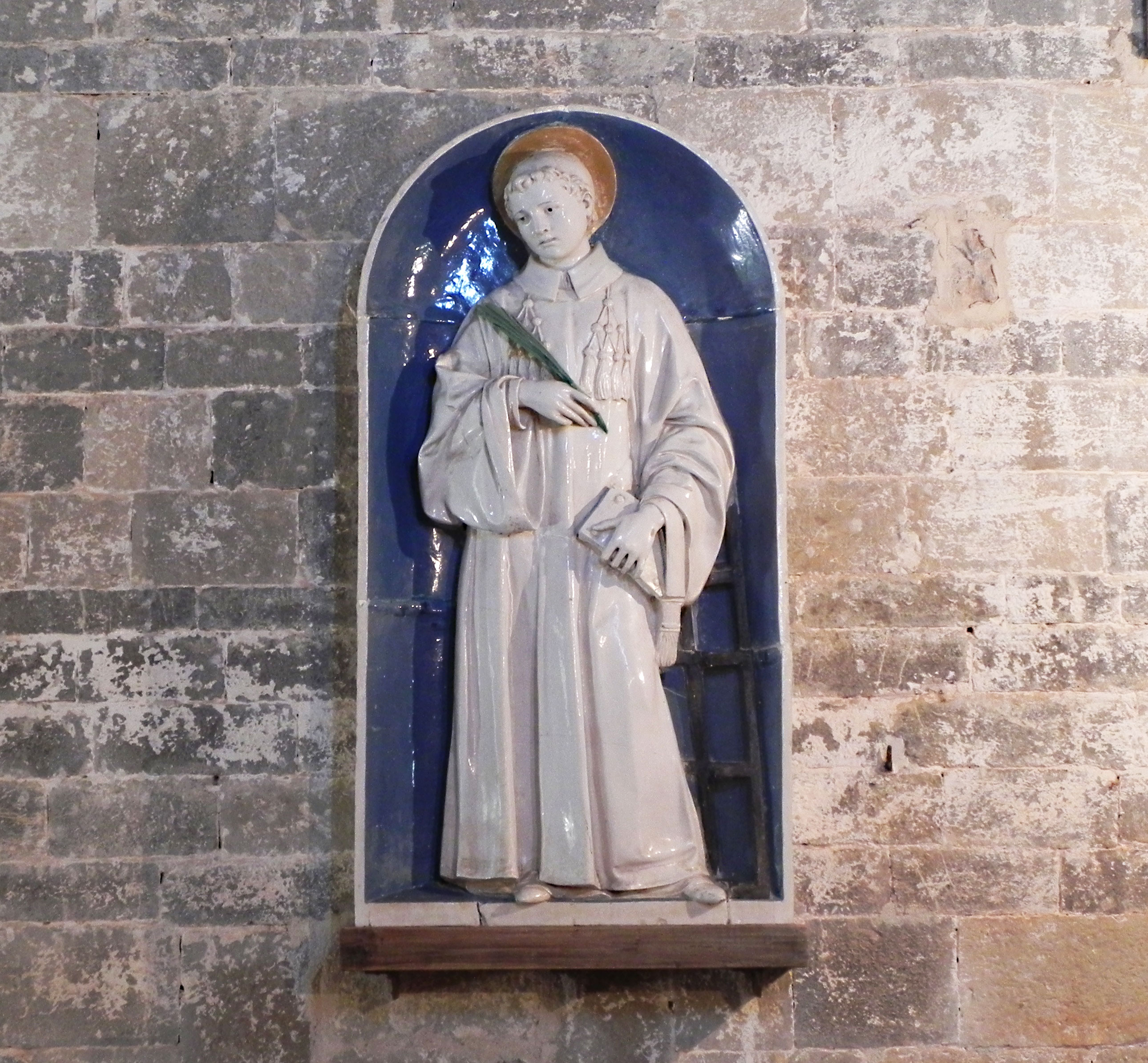 Andrea della Robbia (?) "San Lorenzo", terracotta invetriata, XV secolo Chiesa di San Lorenzo a Corte di Brancoli